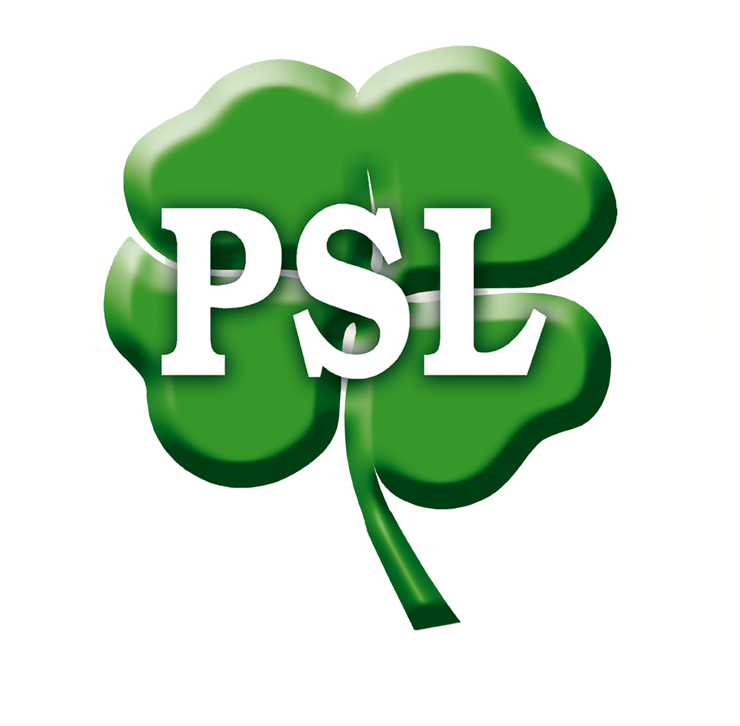 Polskie Stronnictwo Ludowe (PSL)